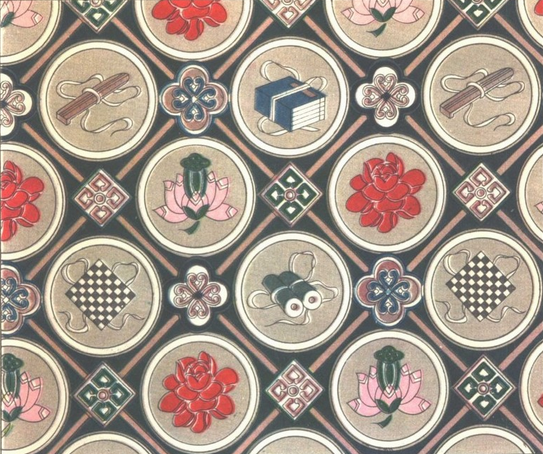 中華人民共和國建國後，由蘇州織錦廠新設計、生產的七彩重錦「琴棋書畫錦」